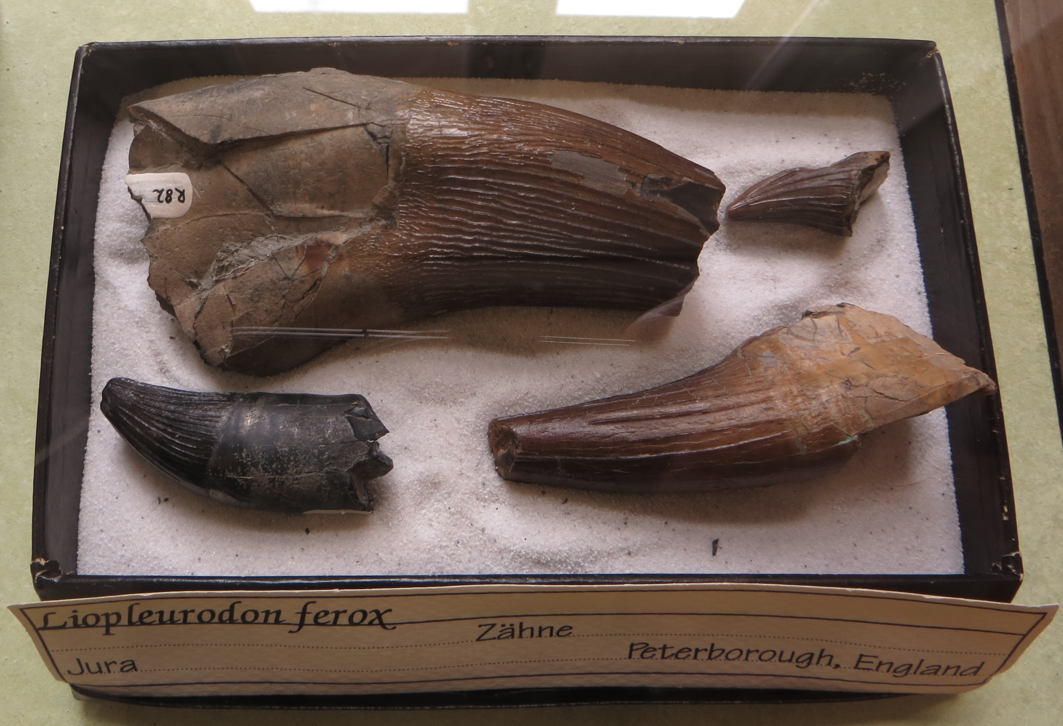 Fossil of Liopleurodon - Took the picture at Goldfuß Museum, Bonn University